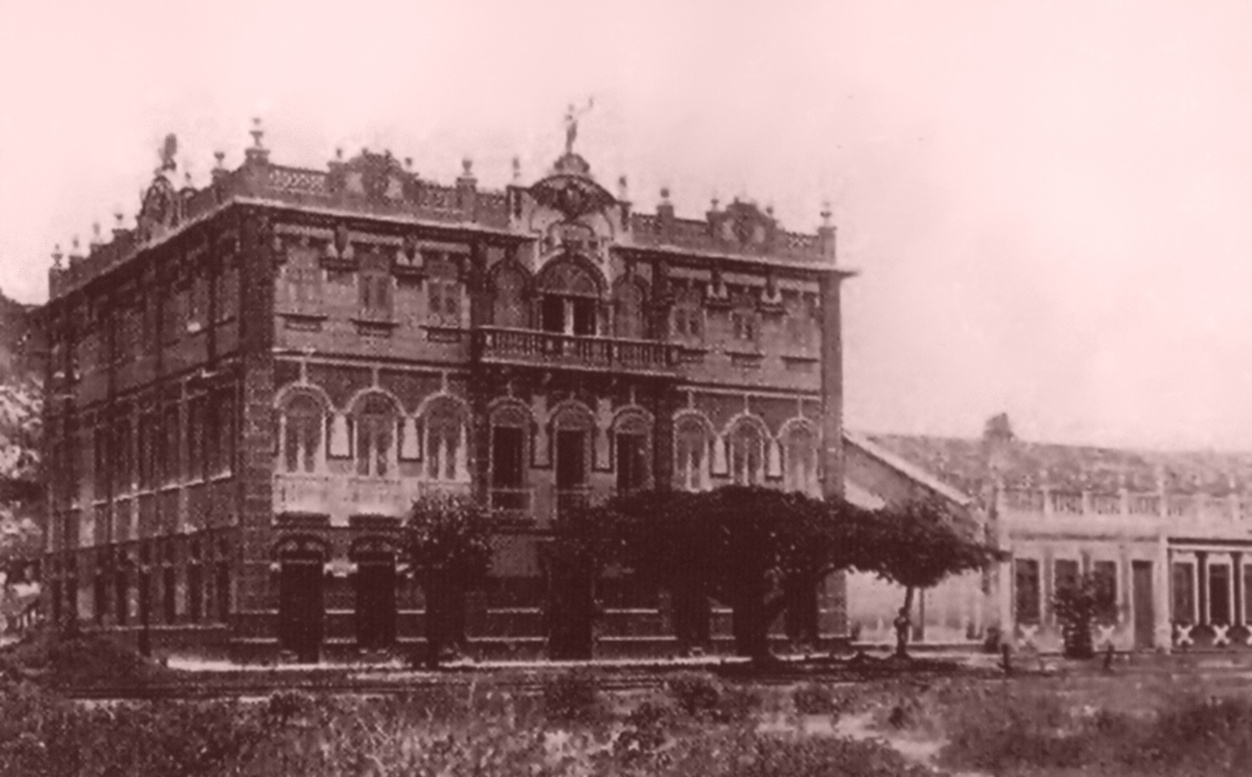 Palacete da família Berbet de Castro, Ilhéus, Bahia, Brasil